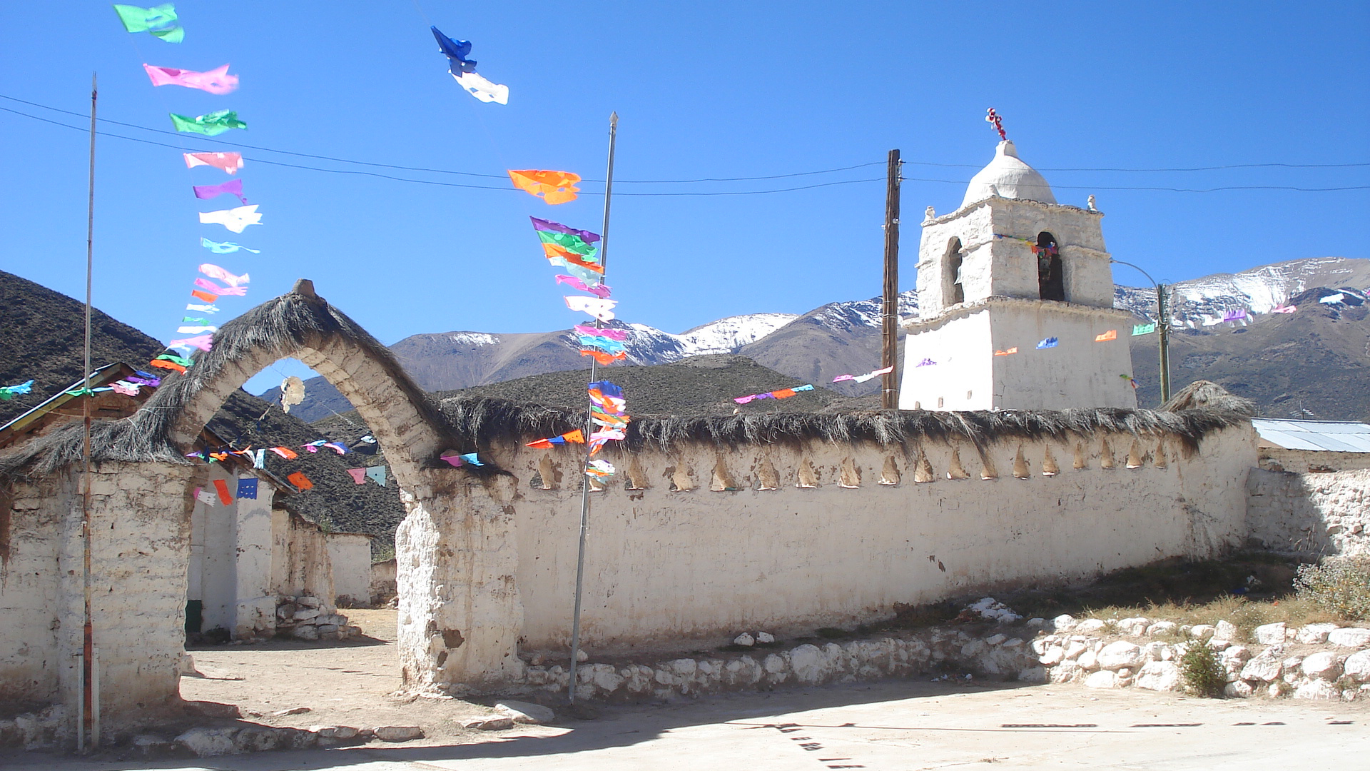 Iglesia de San Andrés Apóstol de Pachama This is a photo of a national monument in Chile: 2227